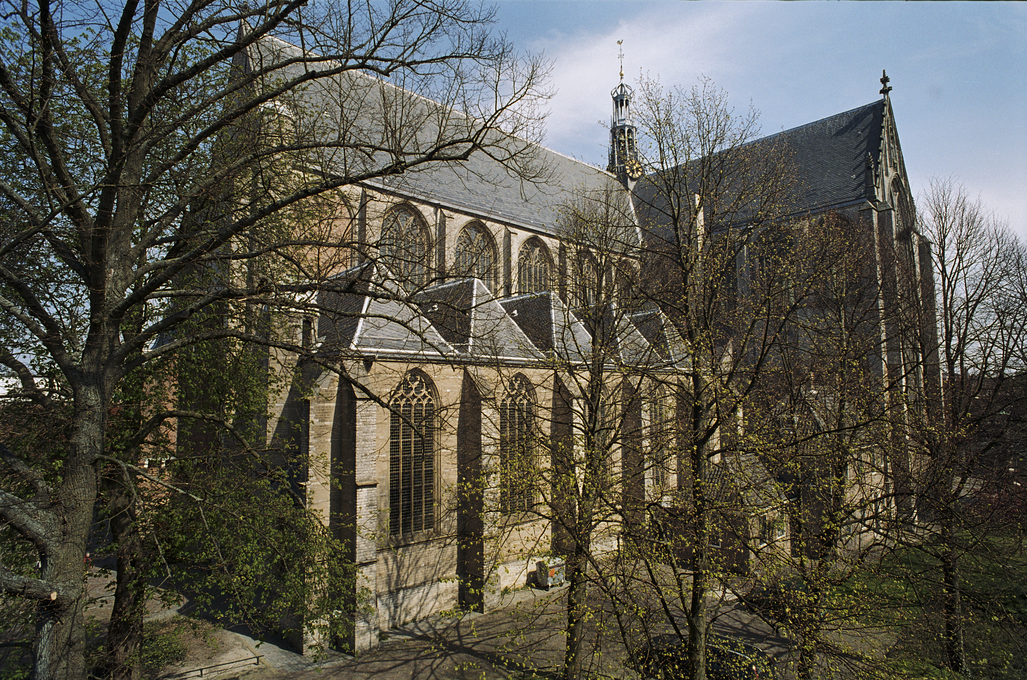 Grote Sint Laurenskerk: Exterieur, zuidwest gevel (opmerking: Gefotografeerd voor Kanjers eerste ronde)